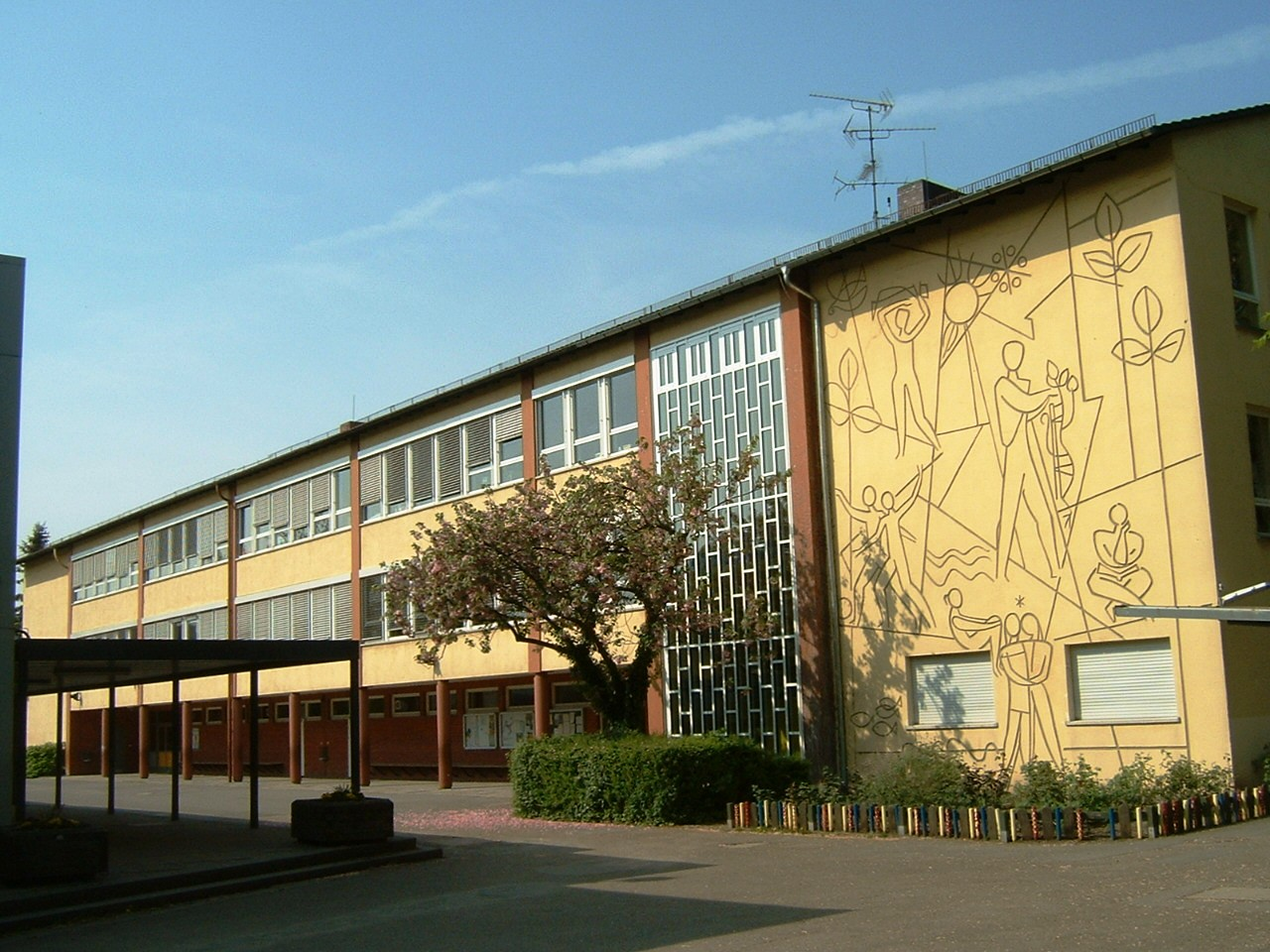 Goldsteinschule; Grundschule mit Förderstufe in Frankfurt am Main Ortsteil Goldstein, erbaut 1952